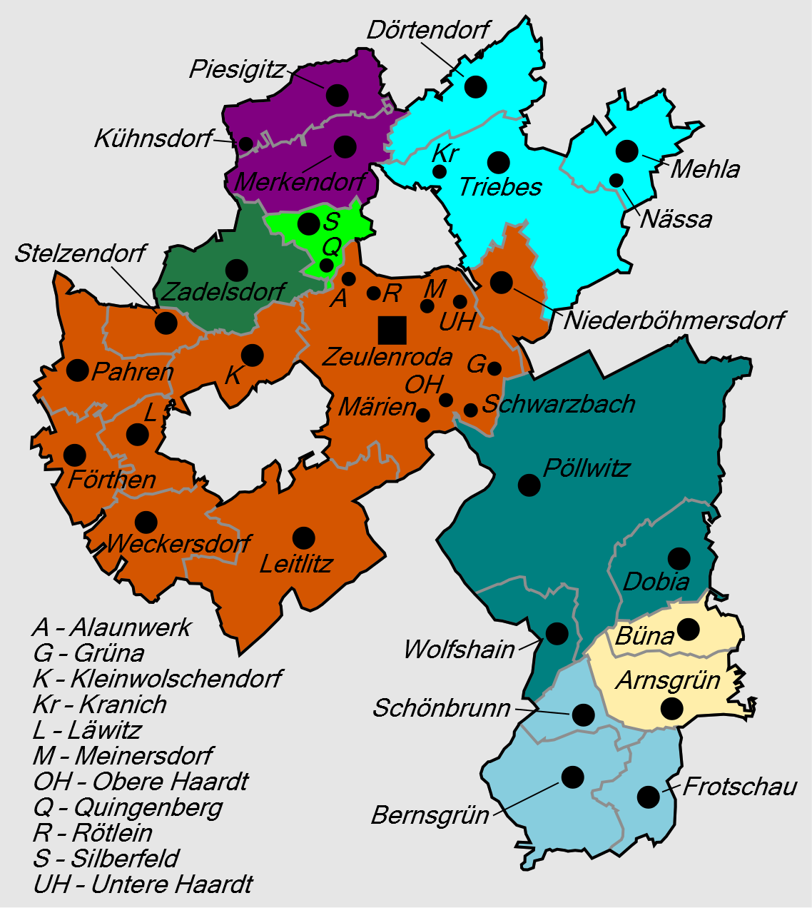 Gliederung der Stadt Zeulenroda-Triebes ab 1. April 1999